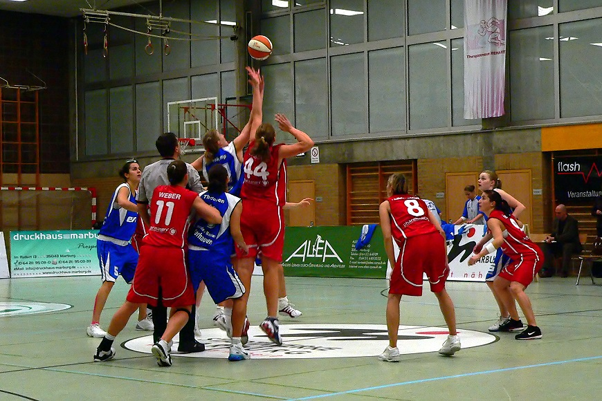 Sprungball beim Basketball